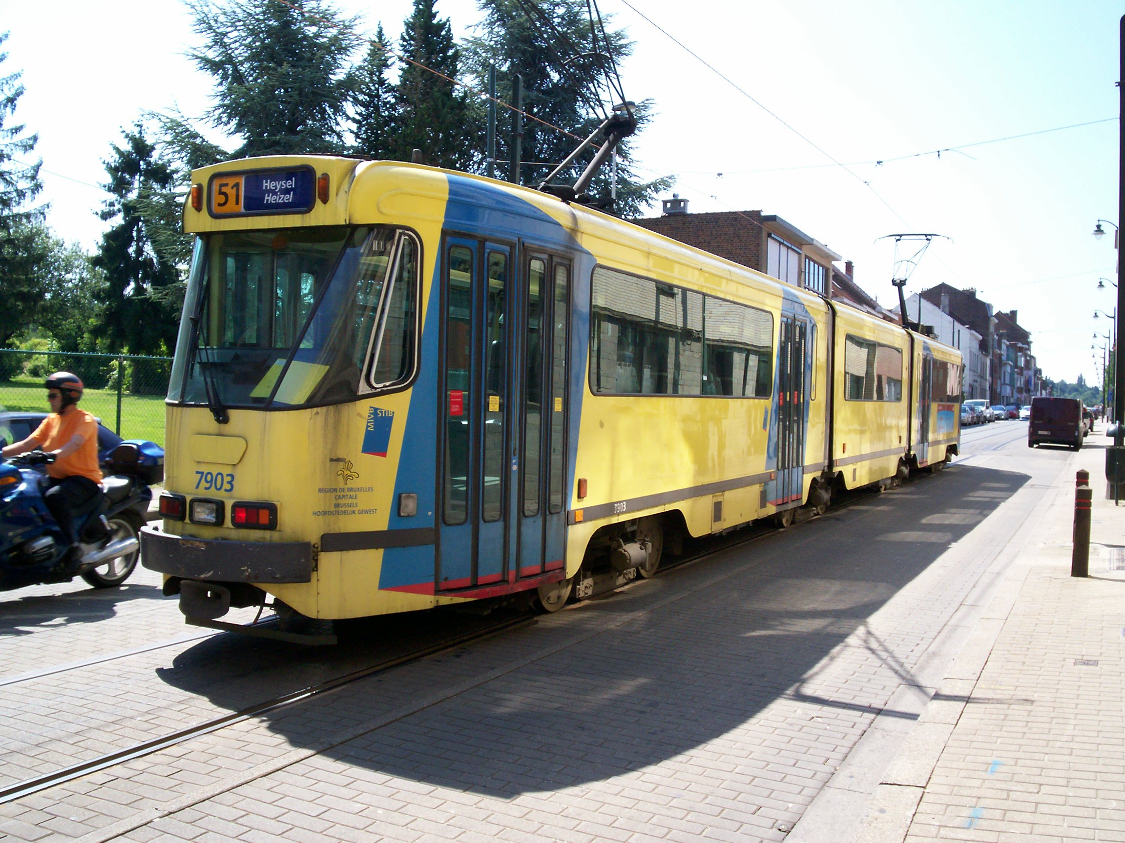 PCC 7900 de la ligne 51 au terminus désormais provisoire de Silence en attendant le prolongement prévu d'ici la fin du mois de septembre à Van Haelen